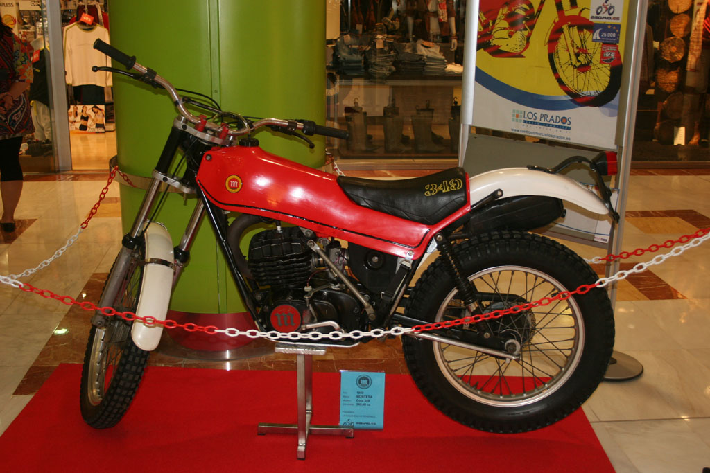 Montesa Cota 349, 1980 349,60 cc.